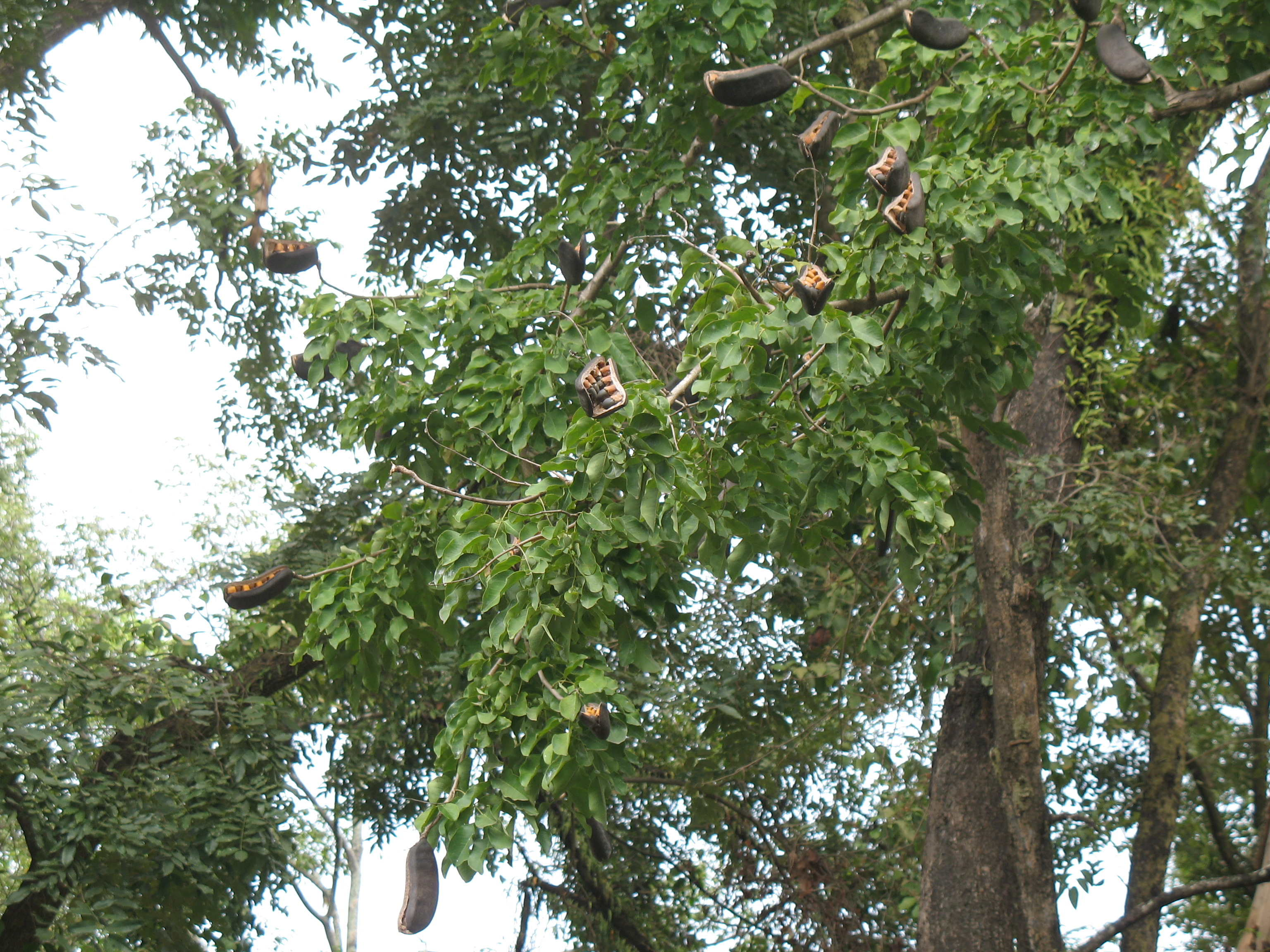 Les gousses s'ouvrent sur l'arbre laissant apparaître de grosses graines noires et orange